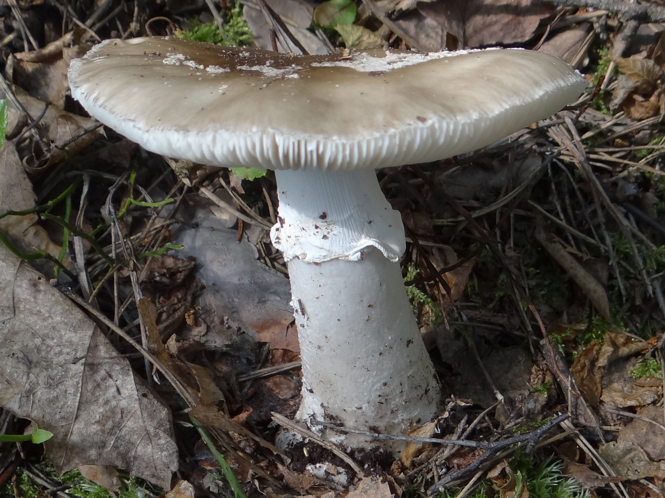 Amanita excelsa